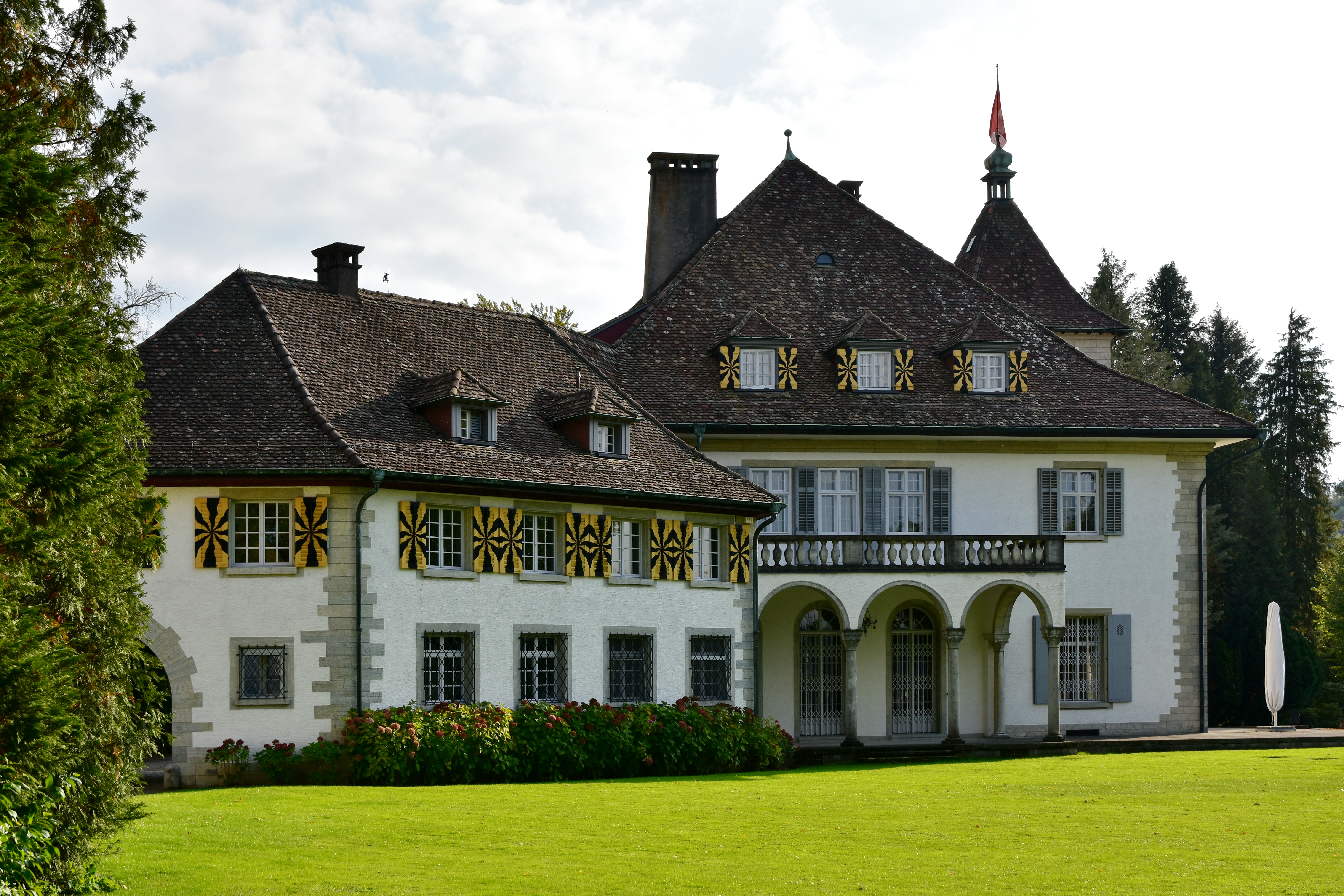 Schloss Au on Au peninsula in Au on Zürichsee lake shore in Switzerland